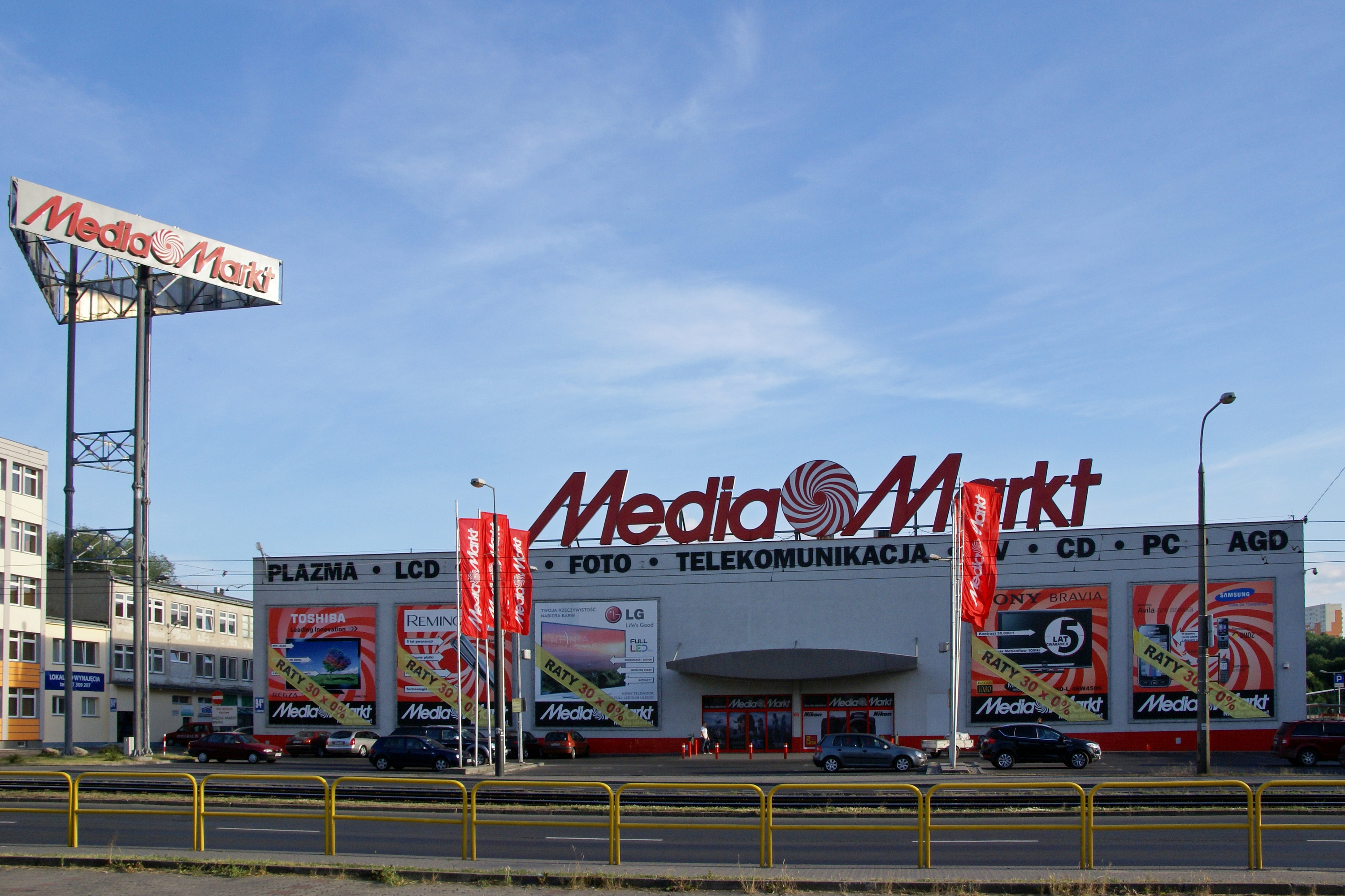 Media Markt w Bydgoszczy, ul. Jagiellonska 94b.